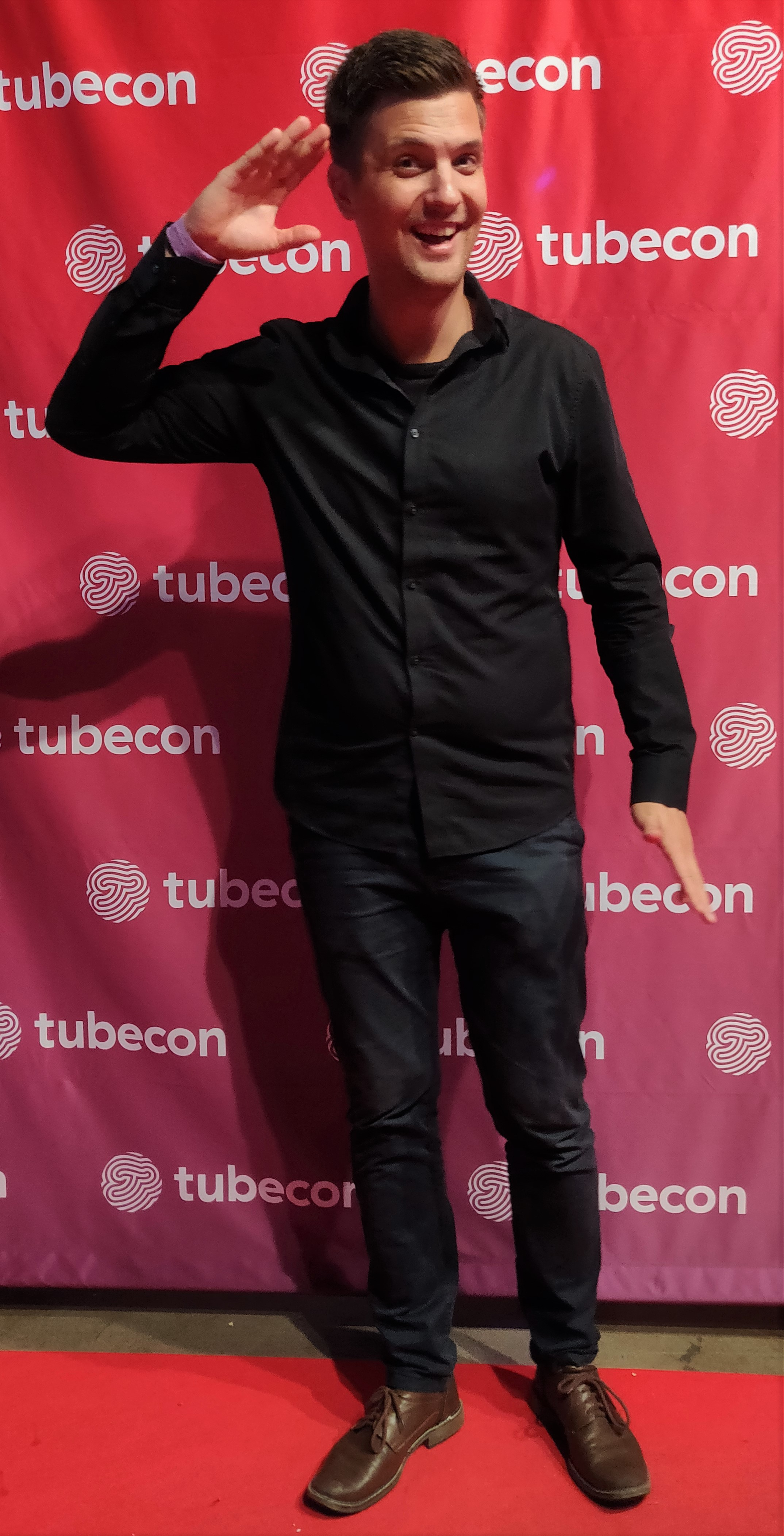 Tubettaja Ville Mäkipelto Tubecon 2018 -tapahtuman Meet & Greet -pisteellä Helsingin Messukeskuksessa.